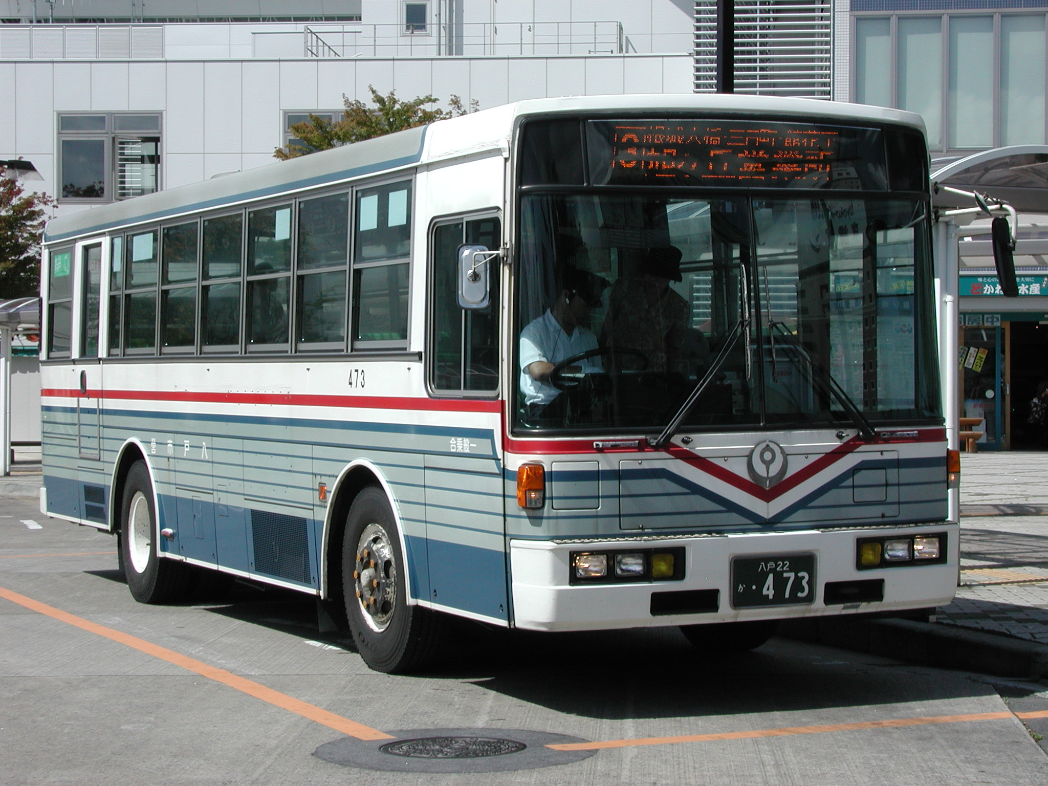 八戸市営バス一般路線塗色（いすゞ・キュービック・U-LV324K：富士7E架装車） 八戸駅東口バスプールにて